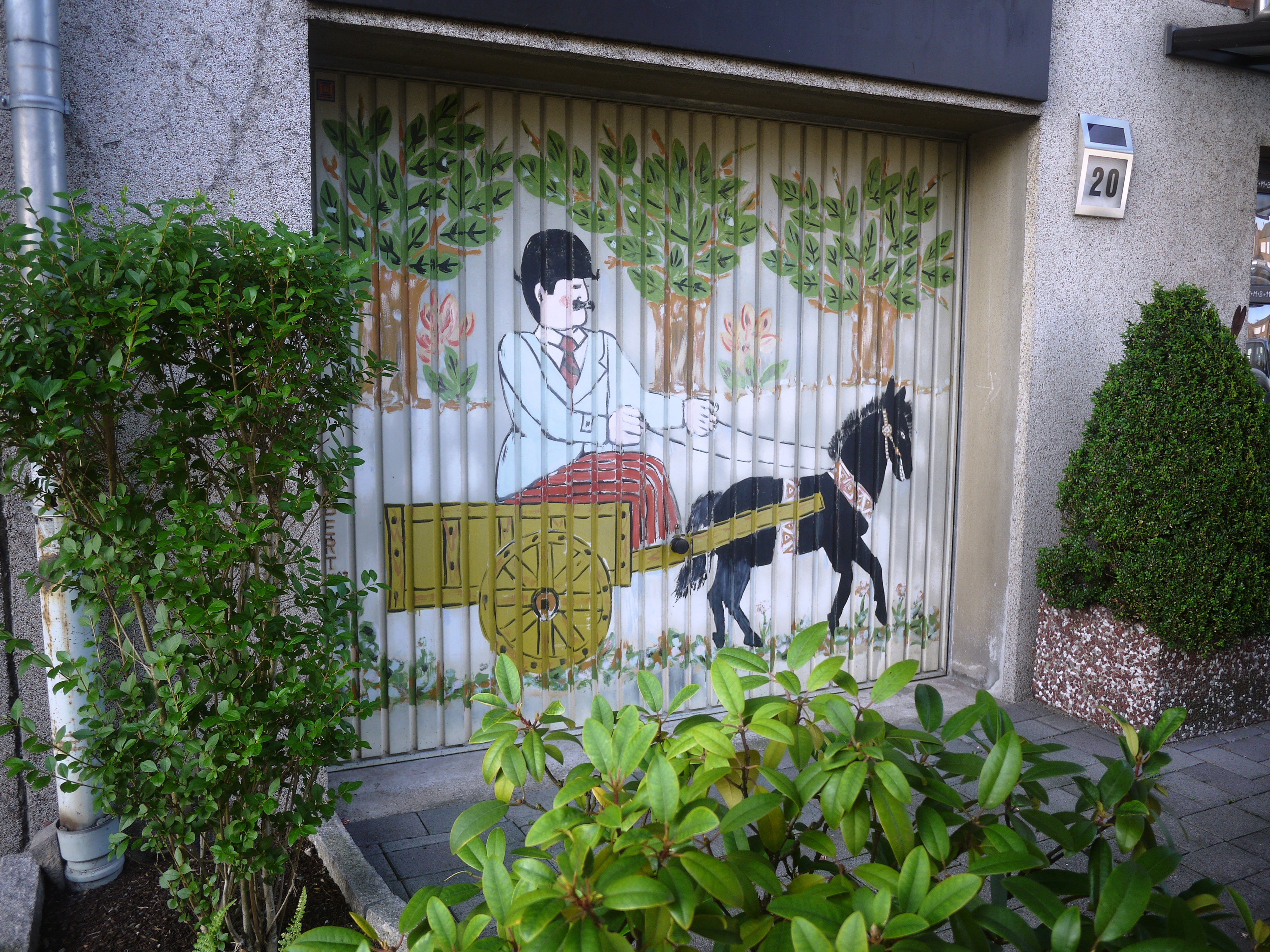 Garagentor mit Bild von Onkel Tobi nach den Kinderbüchern von Hans-Georg Lenzen